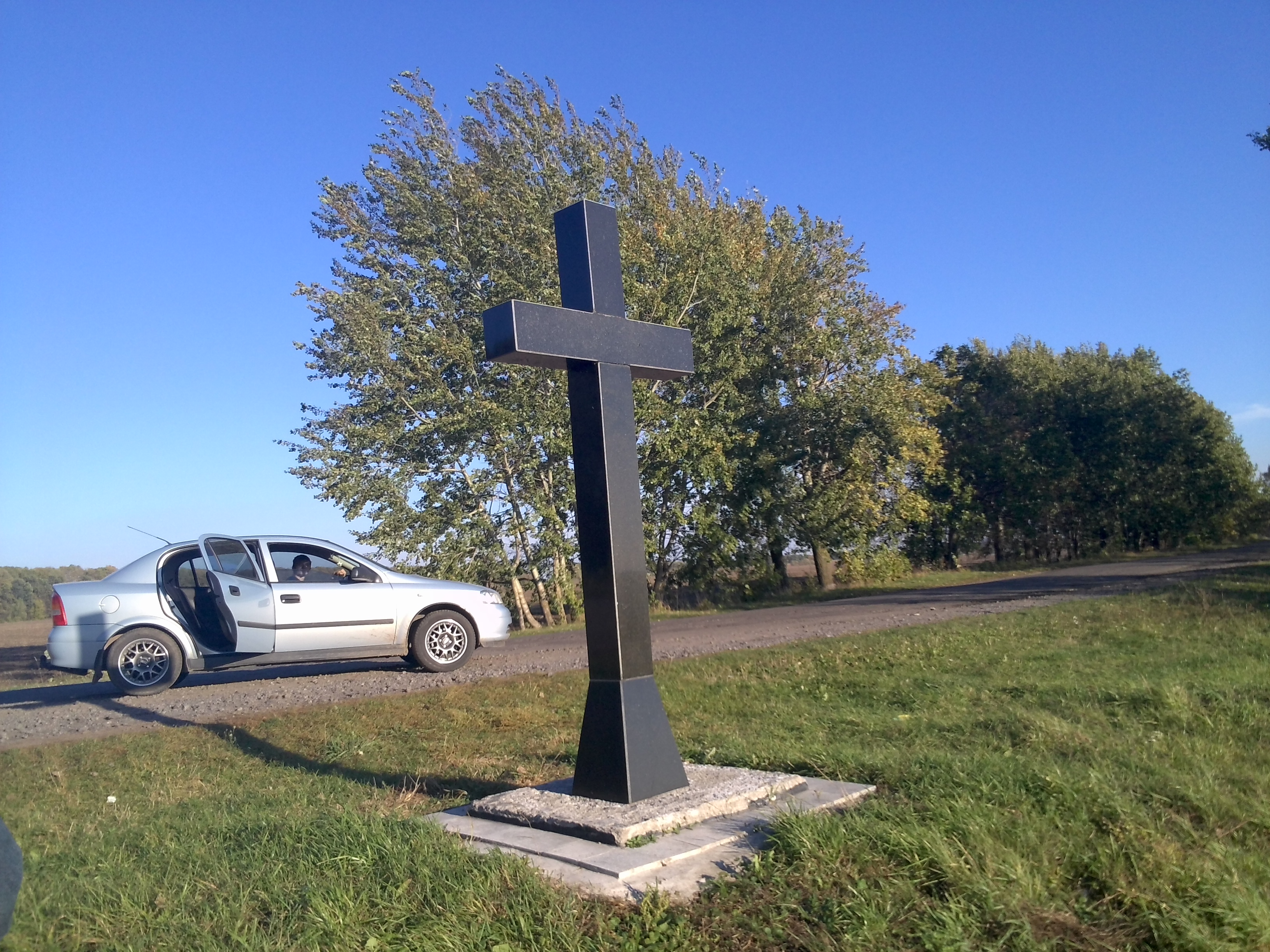 с. Флоріанівка